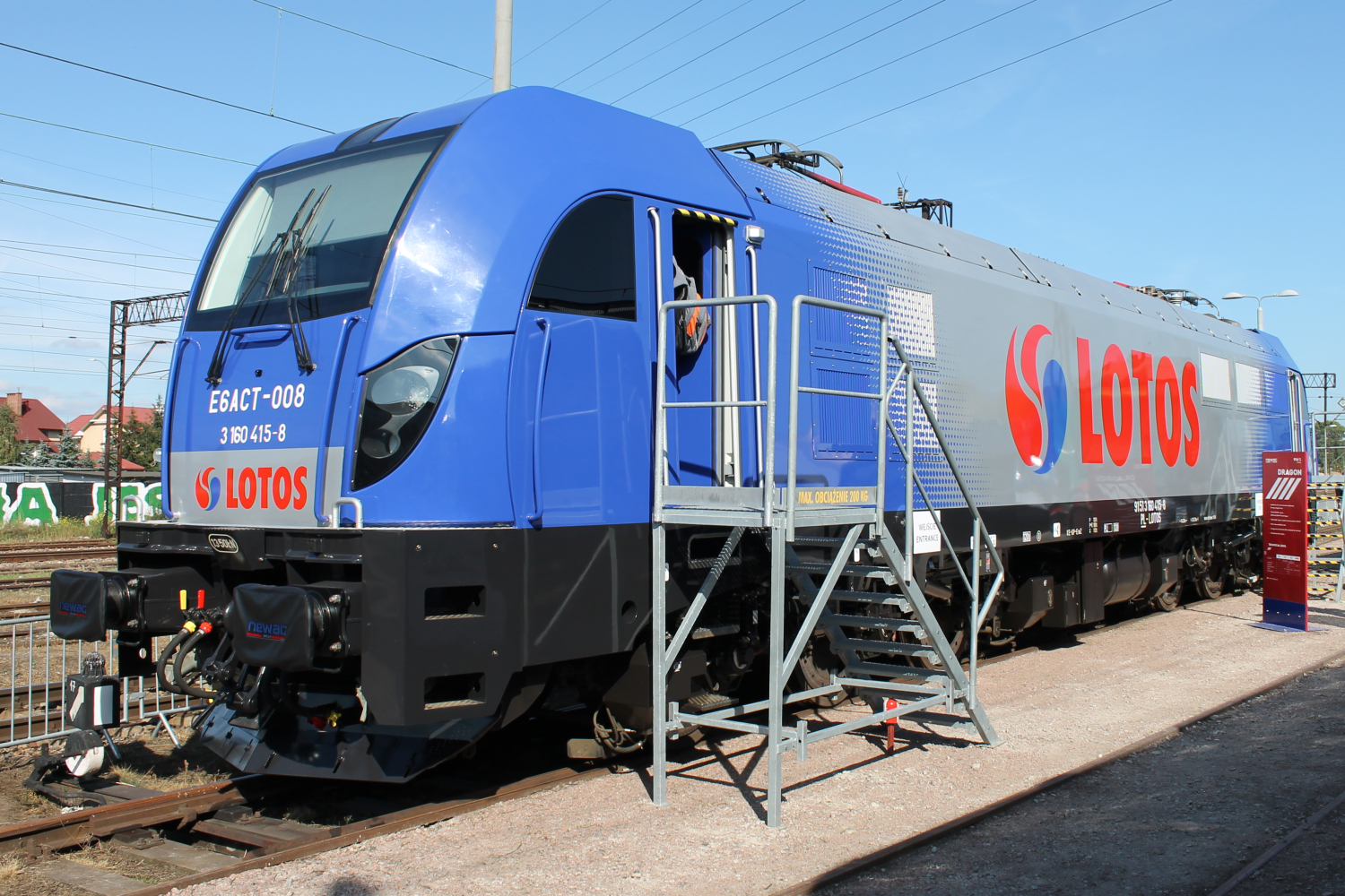 Elektrowóz E6ACT-008 podczas targów Trako 2015. The making of this document was supported by Wikimedia Polska Association, within Wikigrant no. WG 2015-34. English | polski | +/−